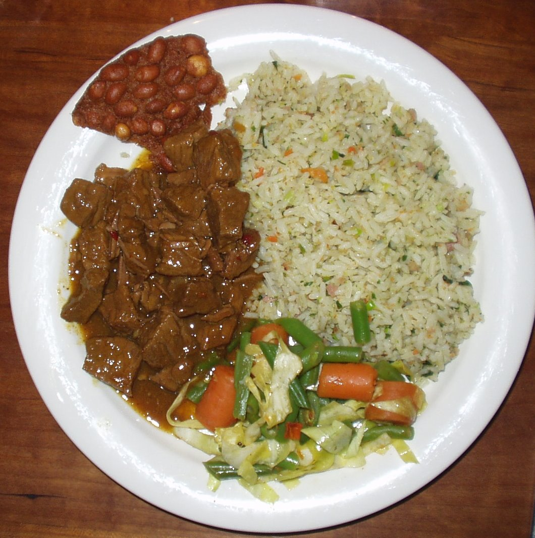 Jawa: Sega karo rendhang.